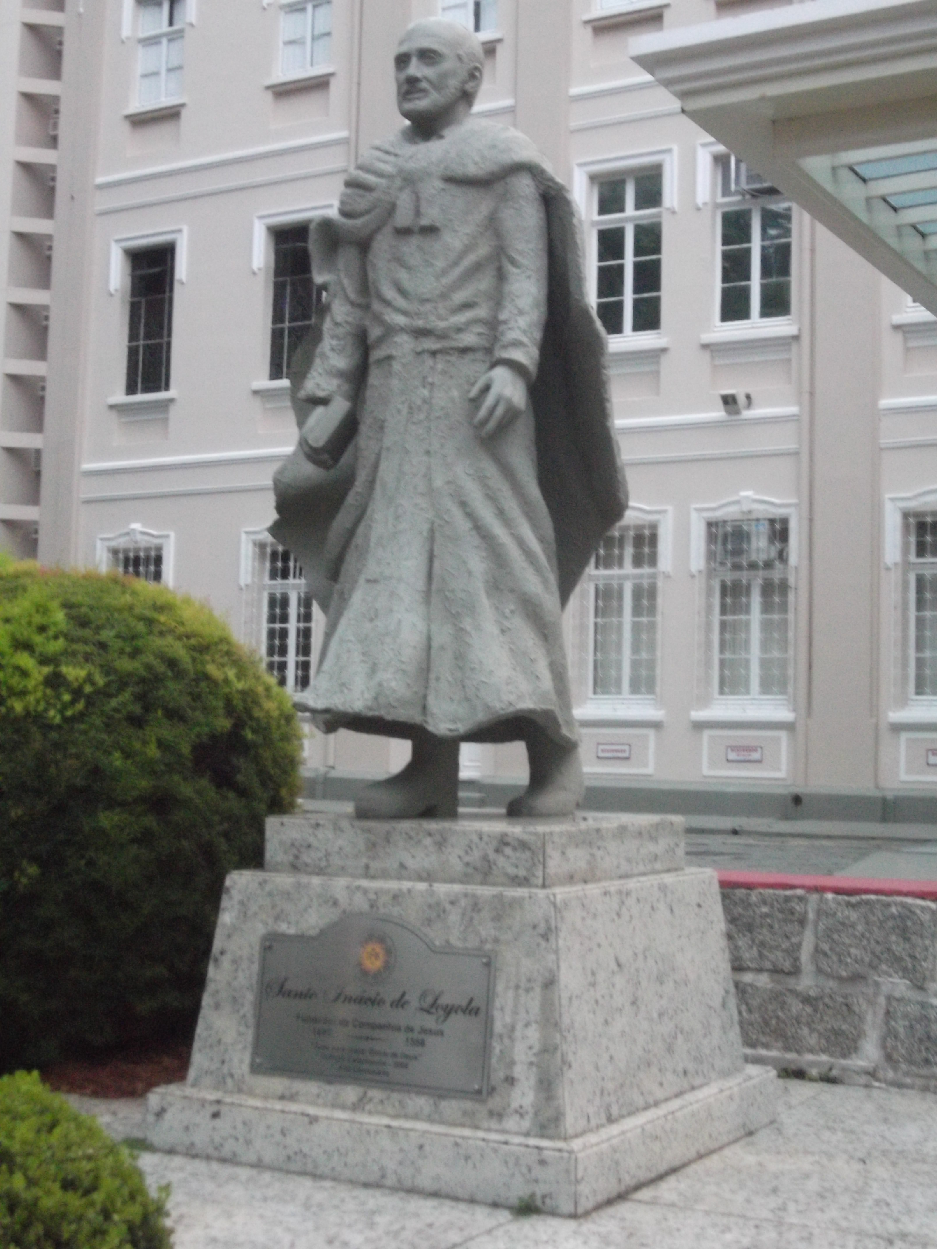 Colégio Catarinense, Florianópolis, Brasil